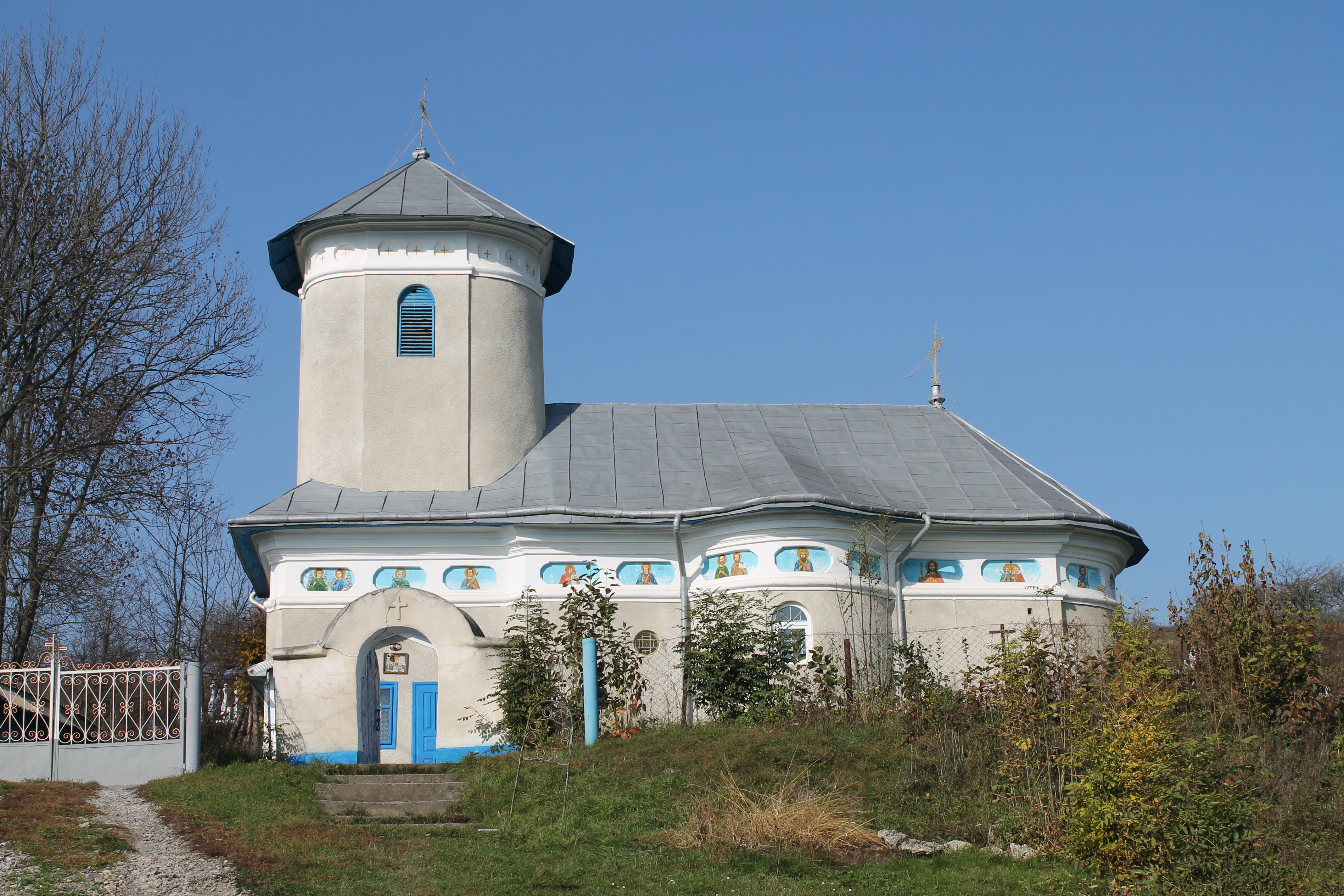 Всіхсвятська церква (мур.), c.Мала Буда